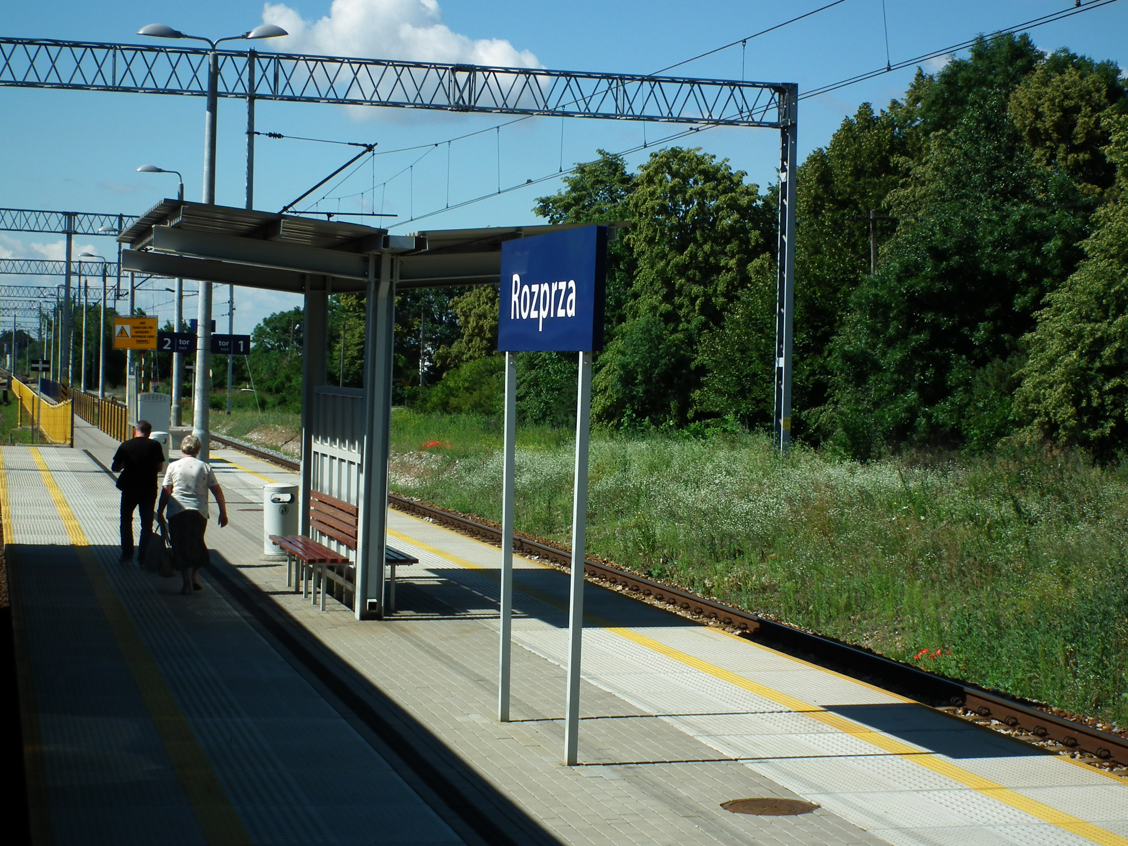 Peron kolejowy w Rozprzy.